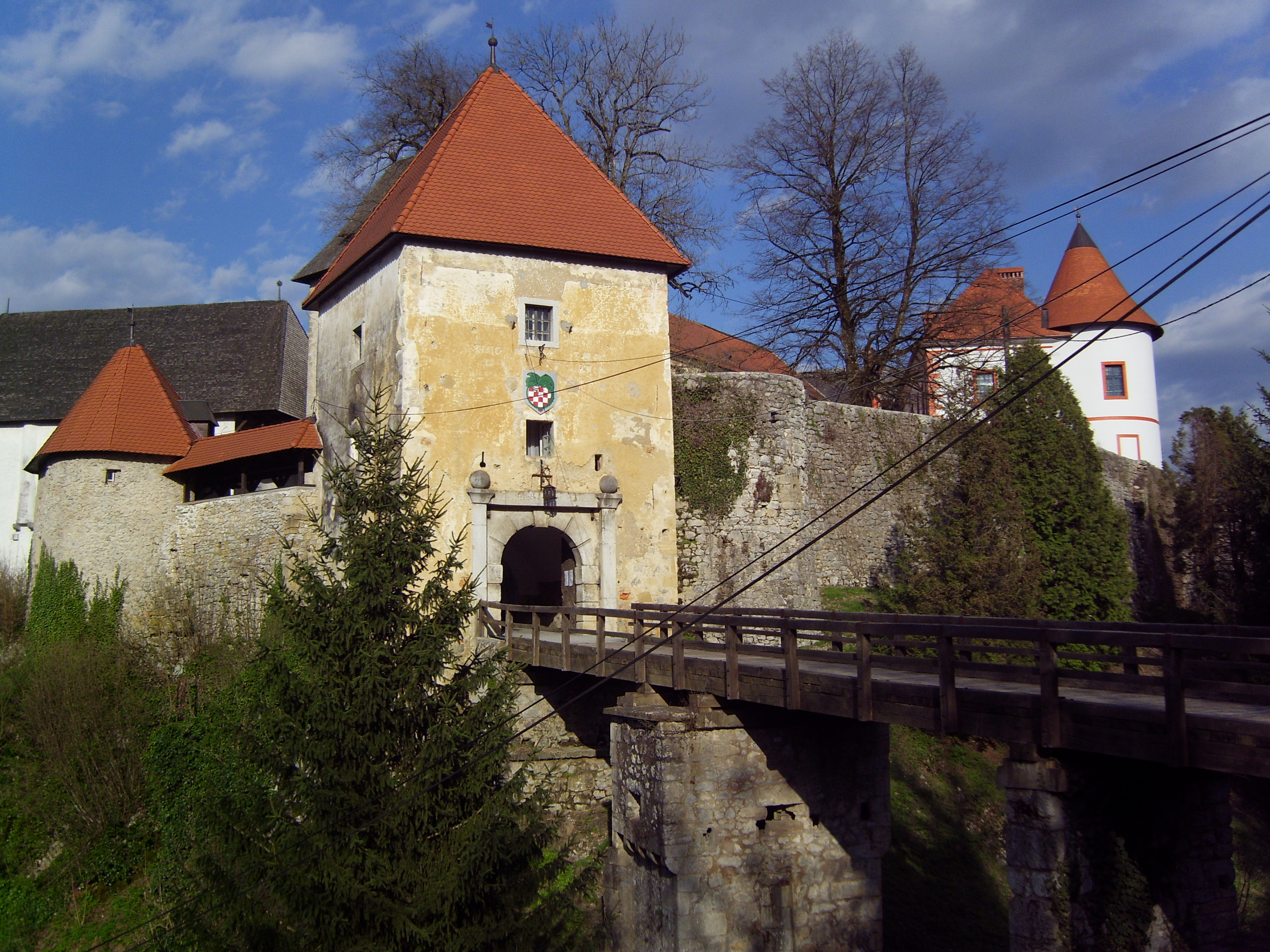 Zugang - Eingang zum Schloss Ozalj